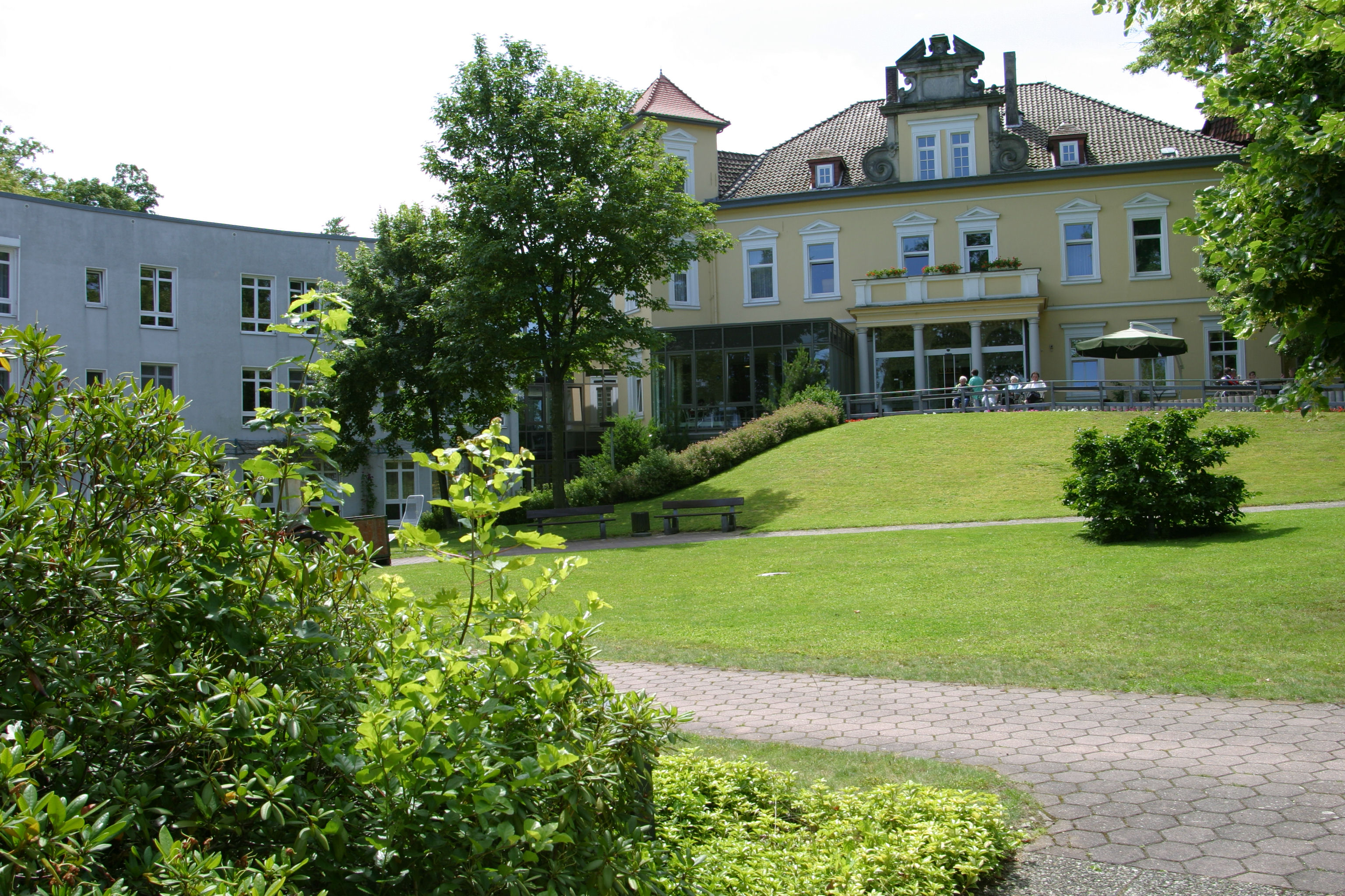 Haupteingang Krankenhaus Lindenbrunn im Jahr 2007